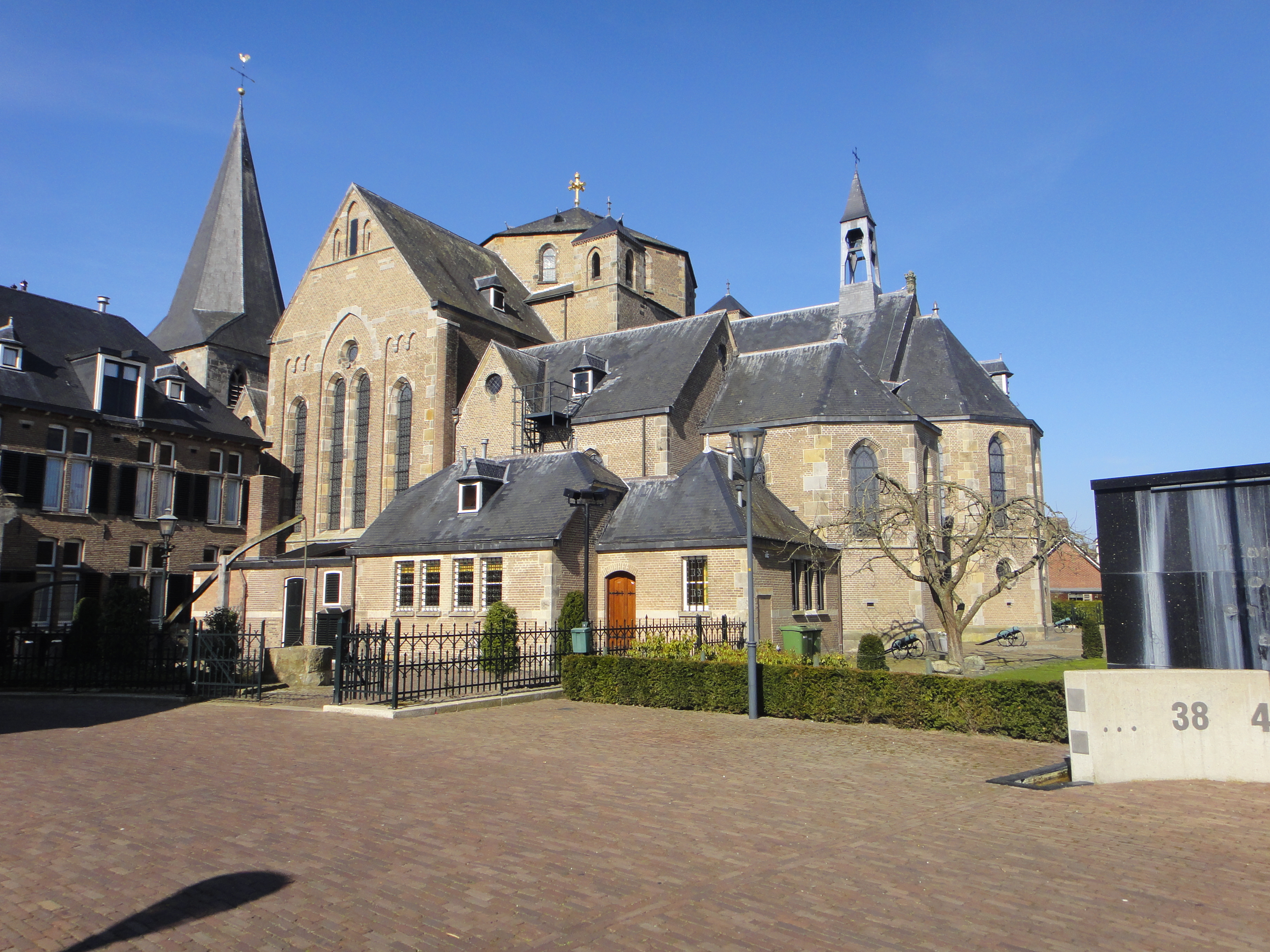 Denekamp - Sint Nicolaaskerk - 2014